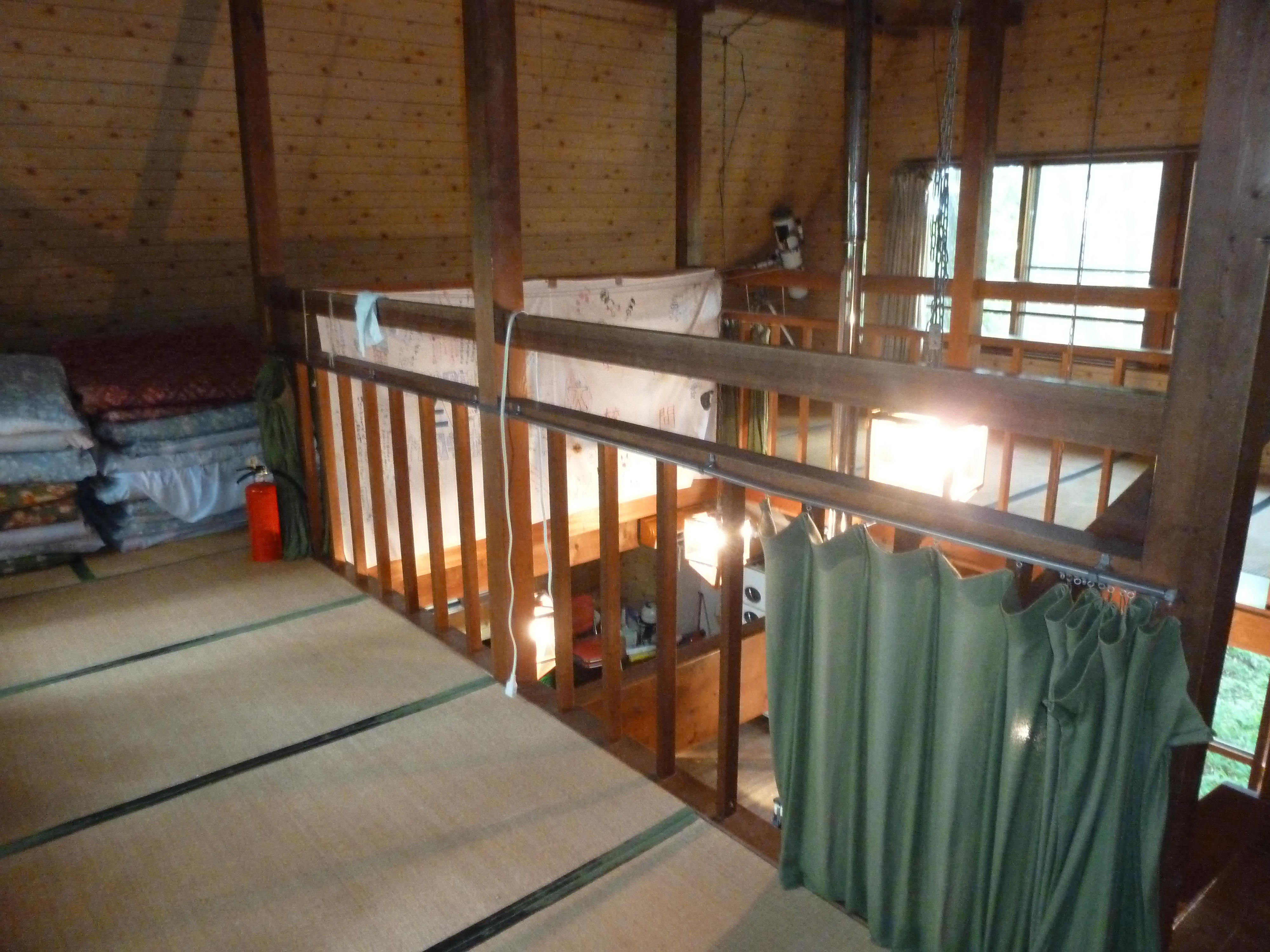 北海道大学恵迪寮と士幌町で共同運営するロッジ「士幌小屋チセ・フレップ」の二階。